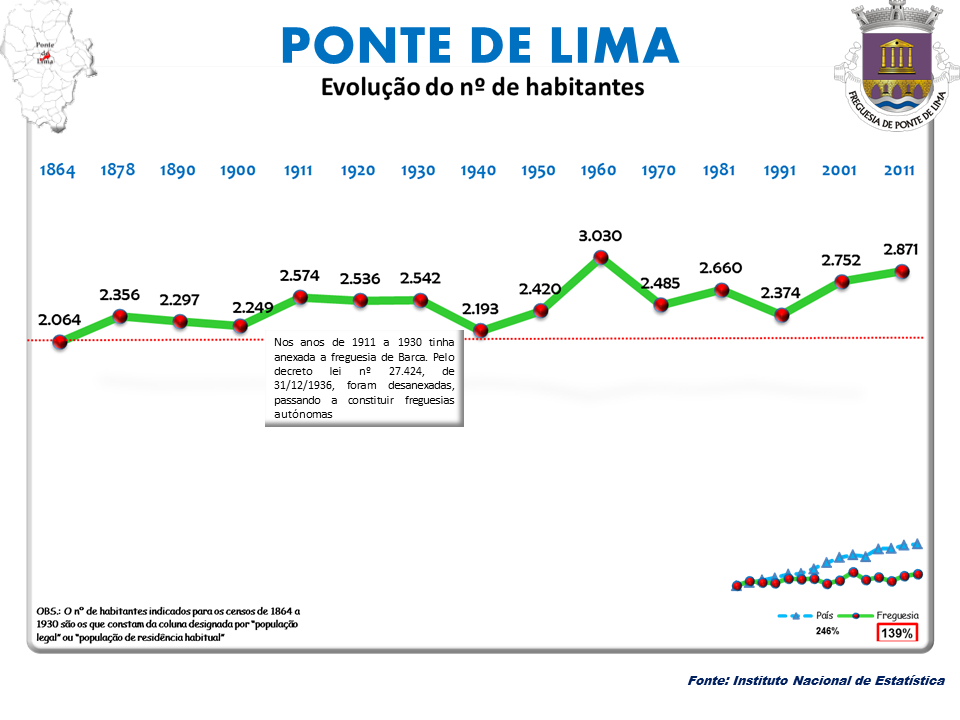 Cenos 1864/2011